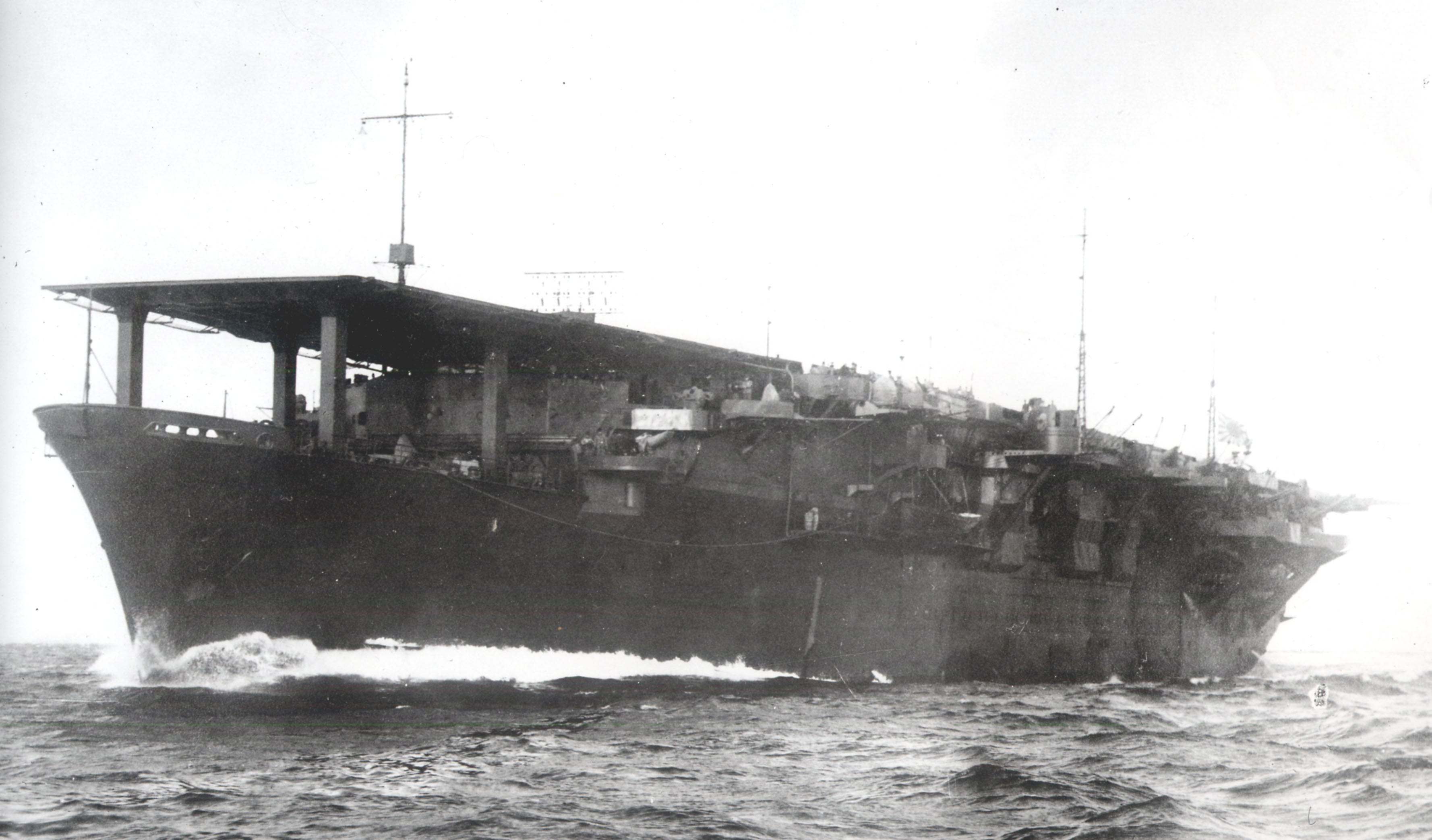 日本海軍航空母艦「海鷹」山口県徳山を出航中の写真。